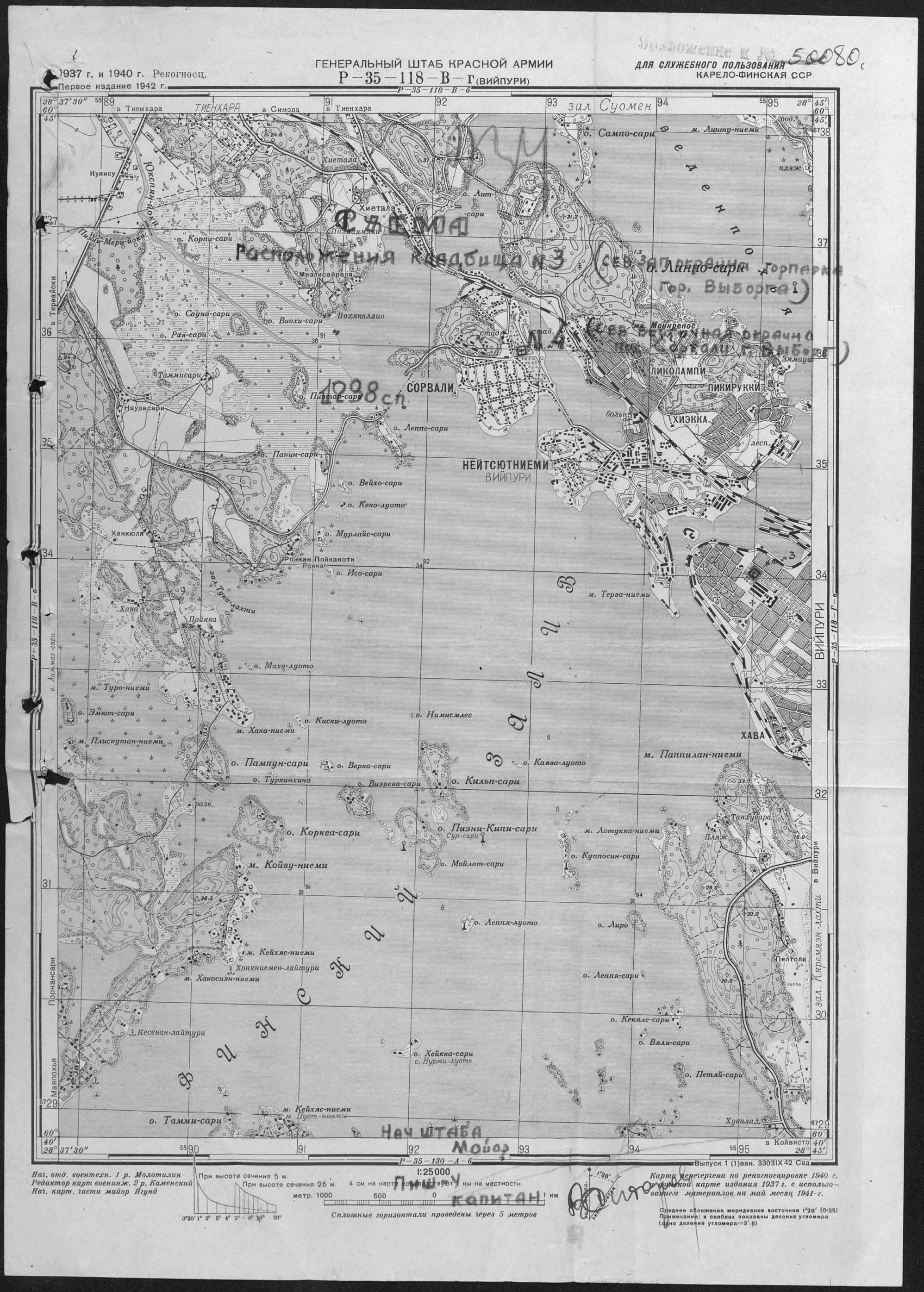 Карта г. Выборга и окрестностей (подготовленная картографическим отделом Генерального Штаба Красной Армии в 1942 г.) - приложение к донесению №50080 от 17.07.1944 о безвозвратных потерях 372-й стрелковой дивизии.